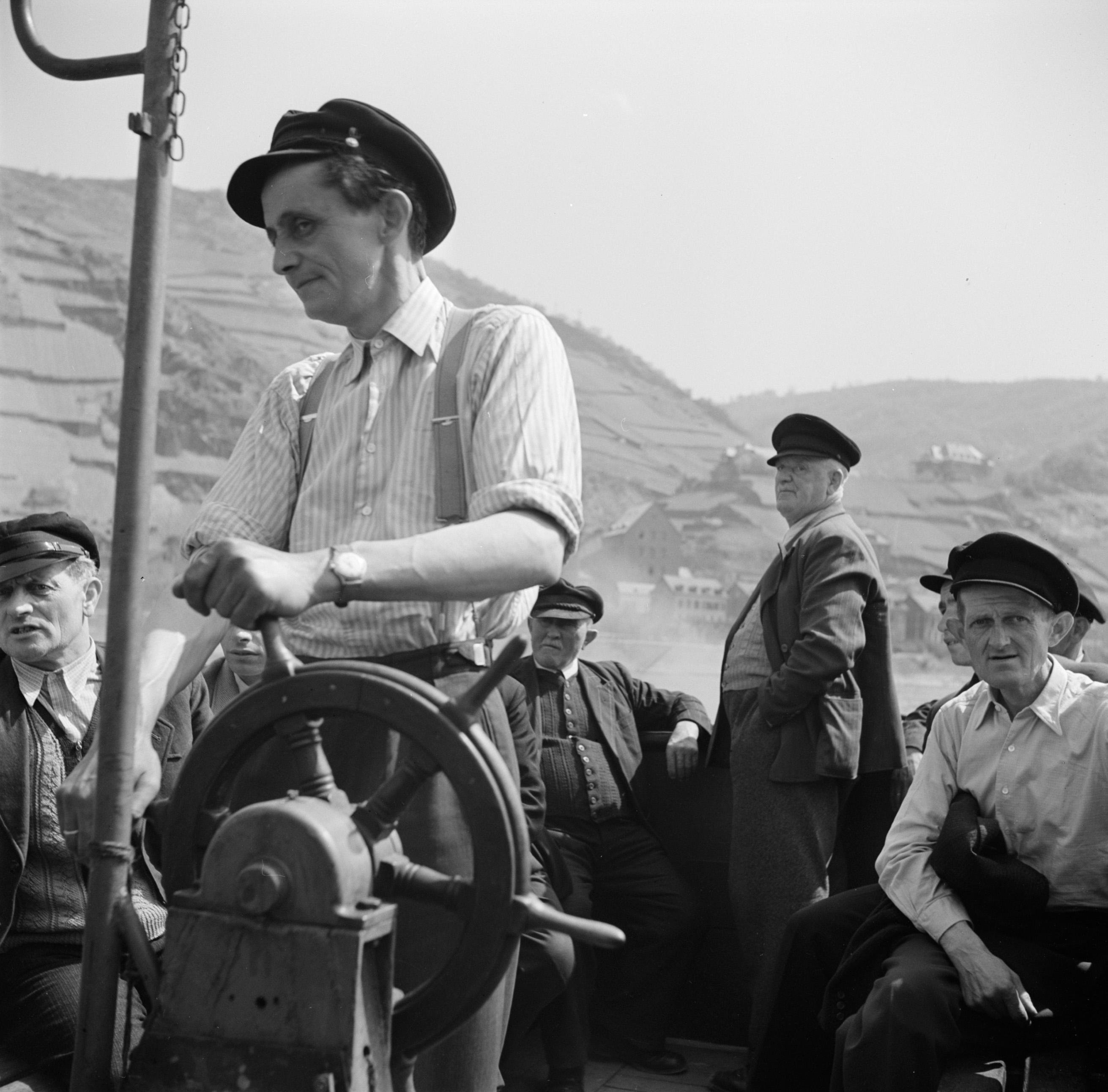 Collectie / Archief : Fotocollectie Van de Poll Reportage / Serie : Rijnvaart, reportage over het leven en werken aan boord van een Rijnschip Beschrijving : Loodsen in hun boot bij Kaub Datum : 1 april 1955 Locatie : Duitsland, Kaub, West-Duitsland Trefwoorden : heuvels, loodsboten, loodswezen Fotograaf : Poll, Willem van de Auteursrechthebbende : Nationaal Archief Materiaalsoort : Negatief (6x6) Nummer archiefinventaris : bekijk toegang 2.24.14.02 Bestanddeelnummer : 254-1572